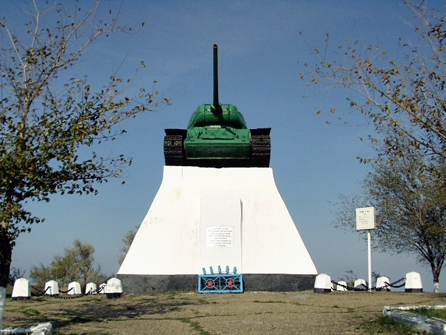 г.Темрюк. Танк в музее "Военная горка"